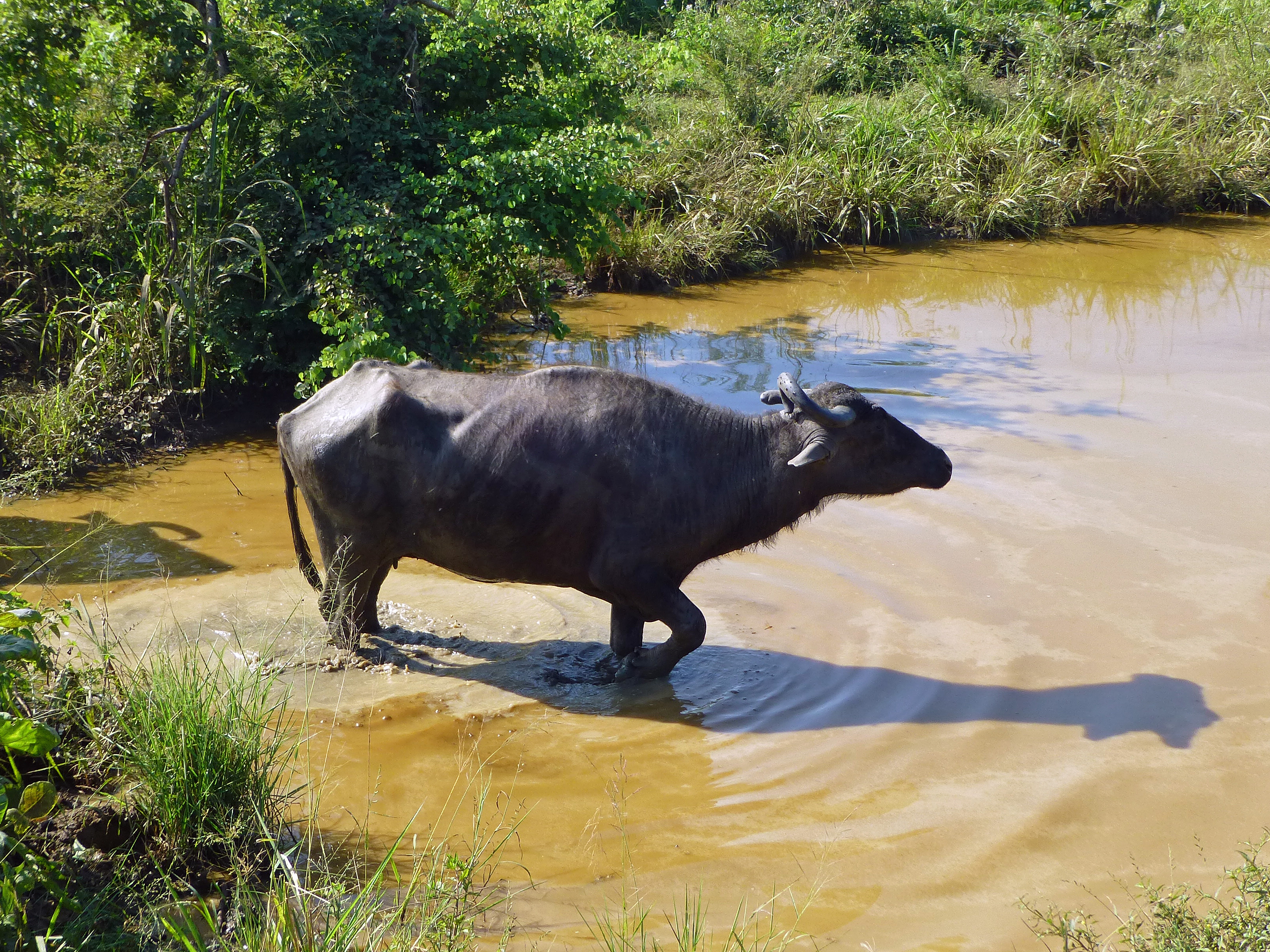 Buffle d'eau au Uda Walawe National Park (Sri Lanka)